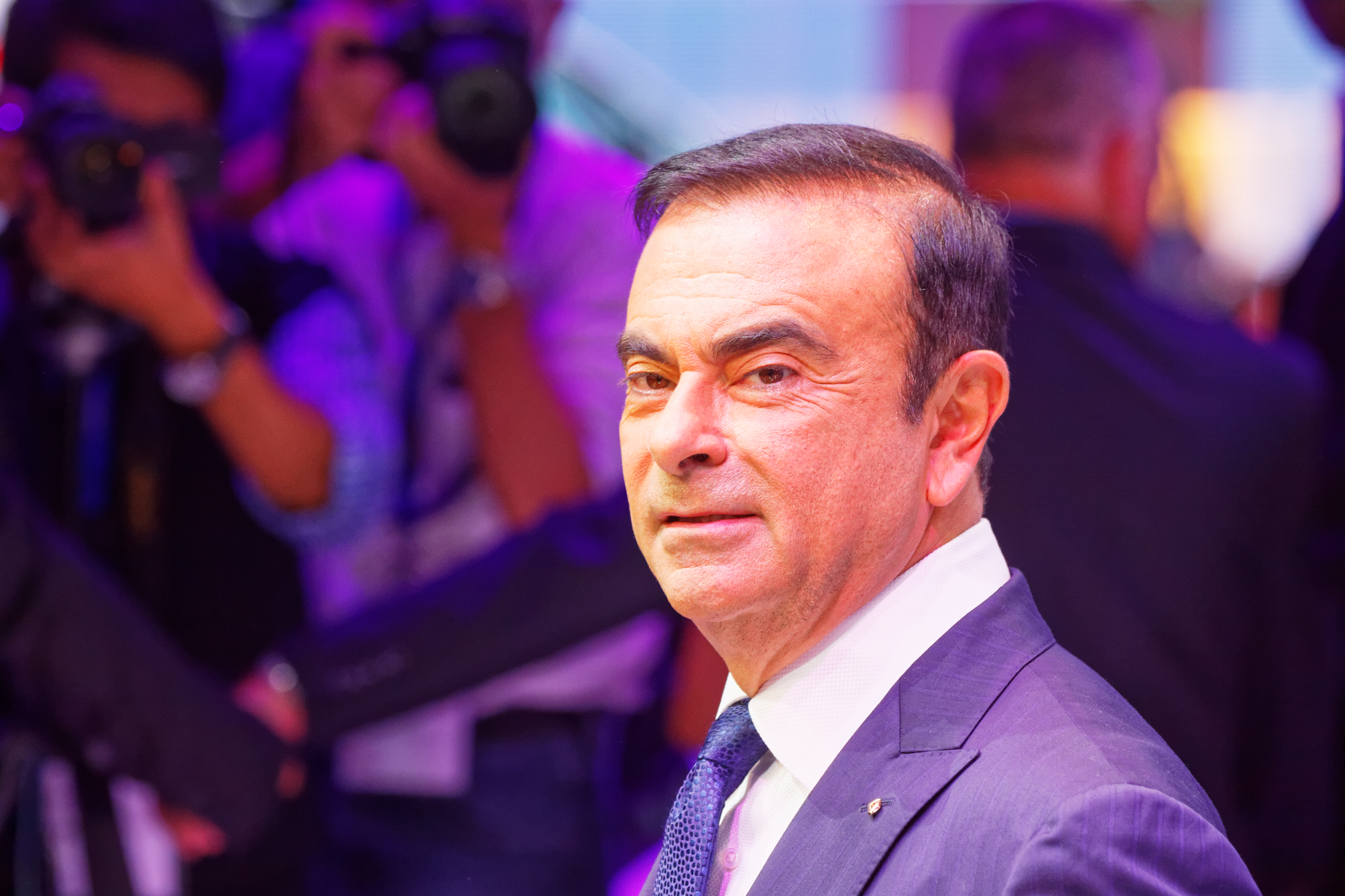 Carlos Ghosn présentant le nouvel Espace Renault lors du mondial de l'automobile de Paris 2014.